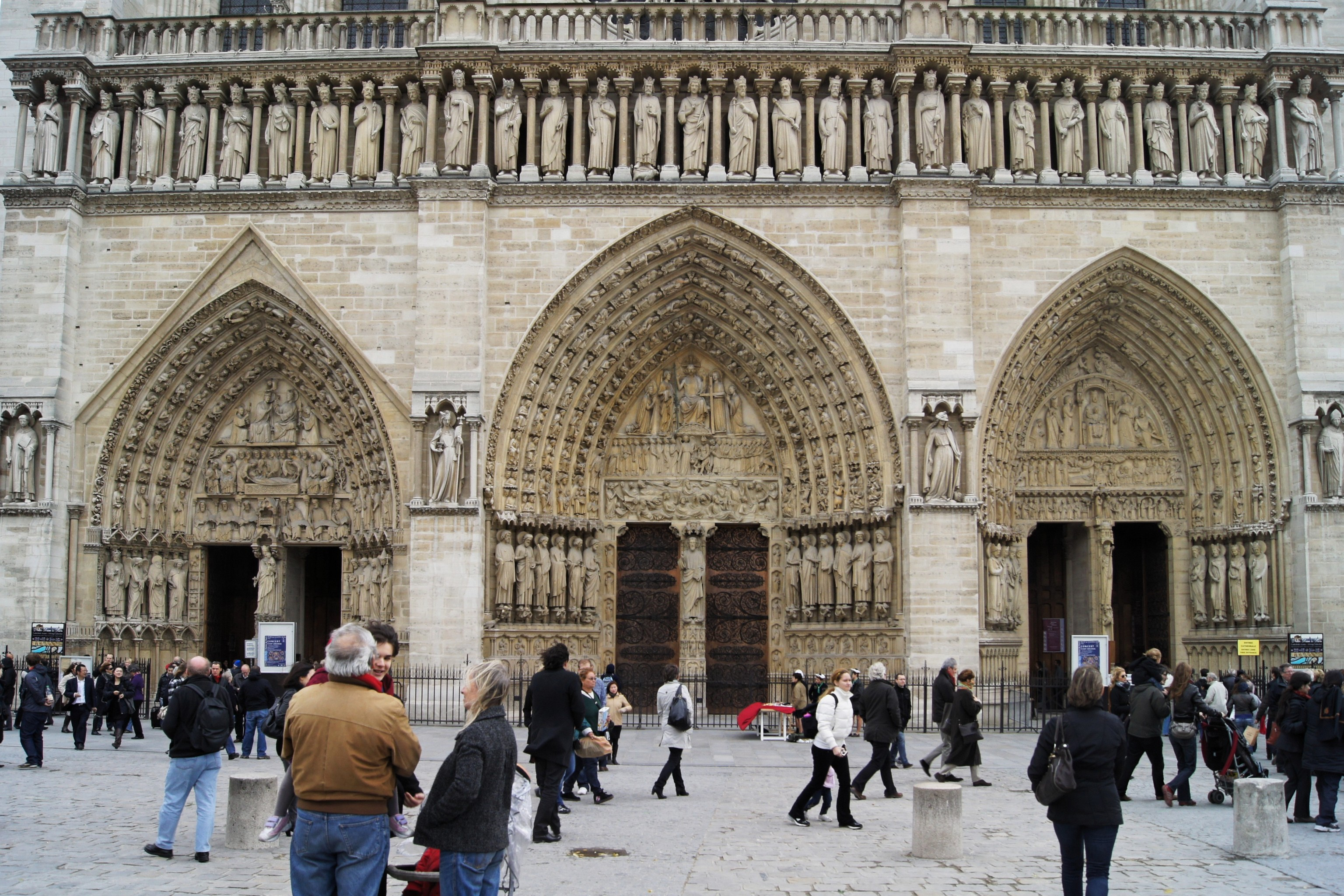 Les détails de l'entrée de Notre Dame de Paris .